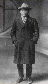 Kim Seong-soo in 1914